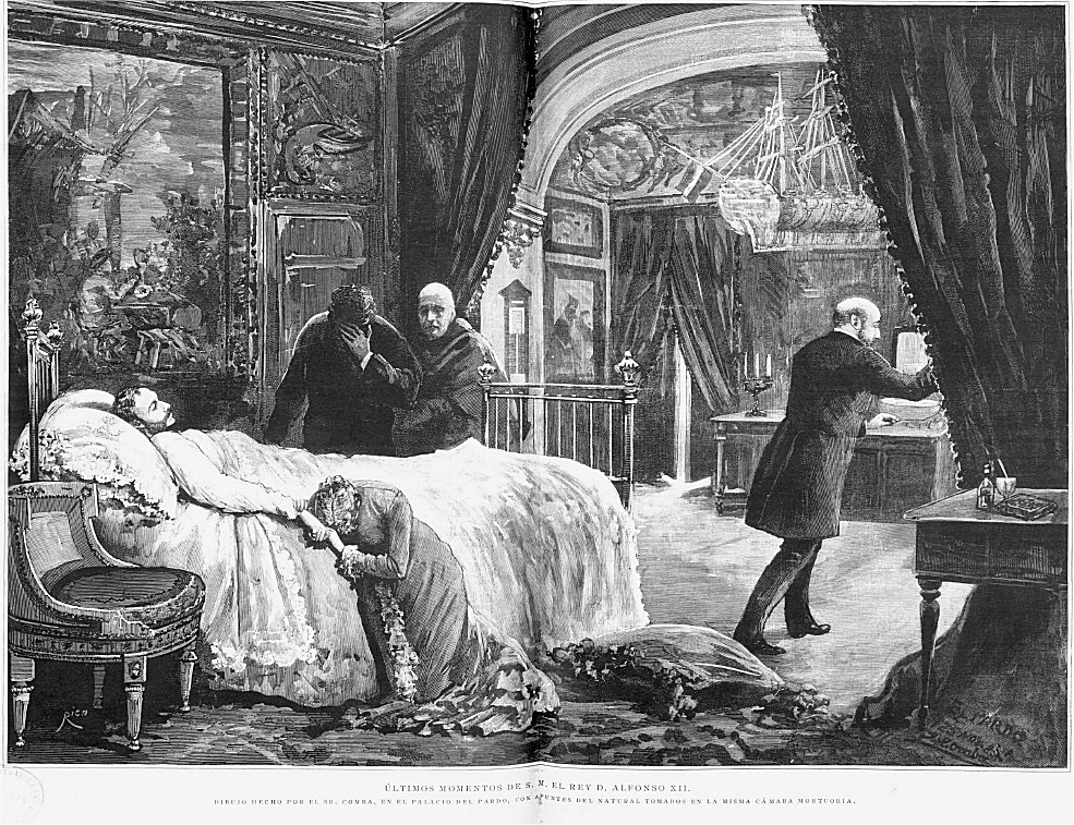 Real Palacio del Pardo - Agonia di Alfonso XII di Spagna